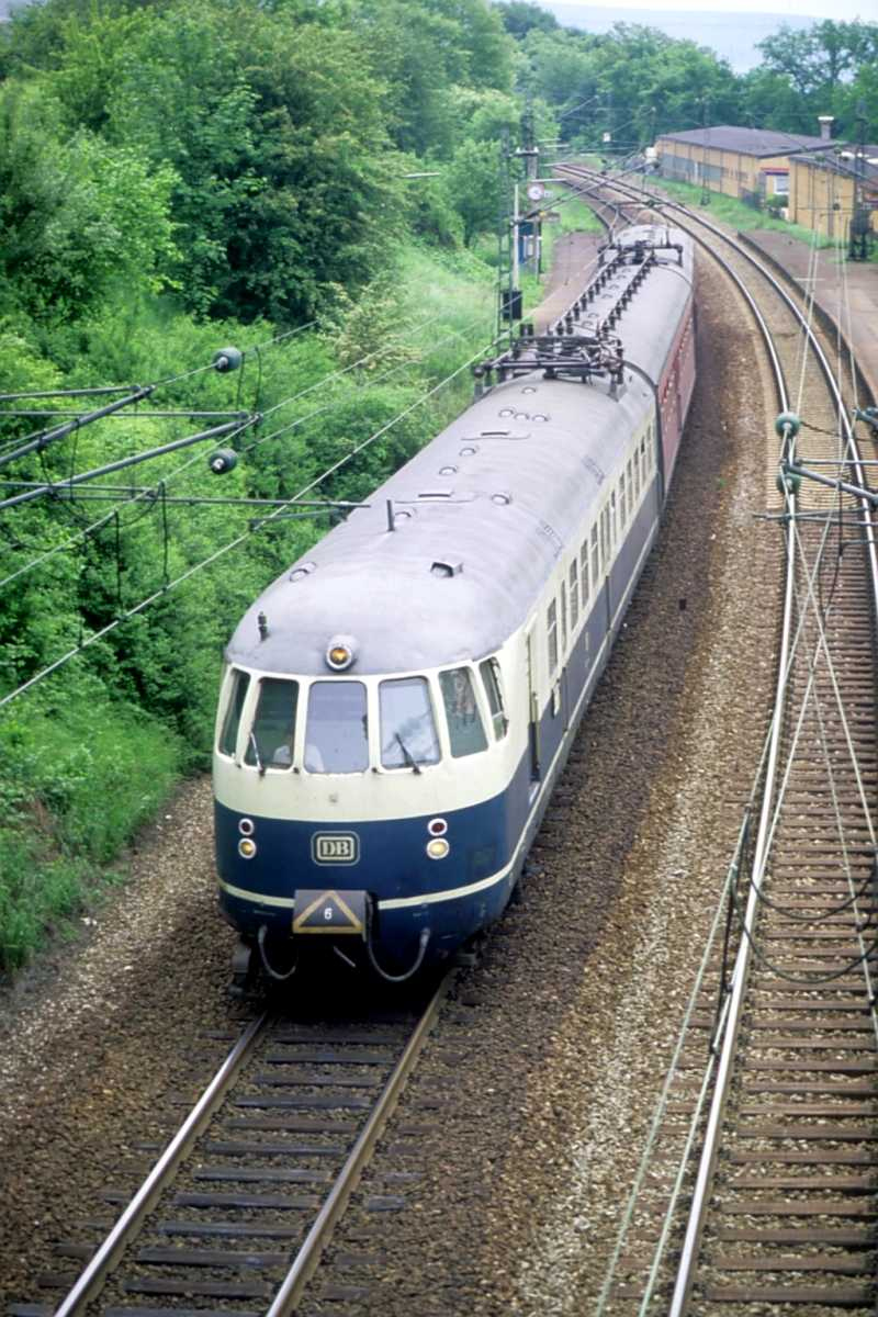 Beschreibung: DB Baureihe 456 im Haltepunkt Binau Quelle: selbst fotografiert 27.5.1986 Fotograf: Benedikt Dohmen (user: Benedictus), Archiv-Nr. 90/13 Copyright Status: GNU Freie Dokumentationslizenz